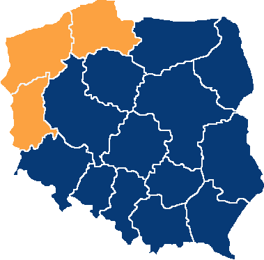 Carte du premier tour de la présidentielle polonaise de 2020 - Candidat en tête par voïvodie